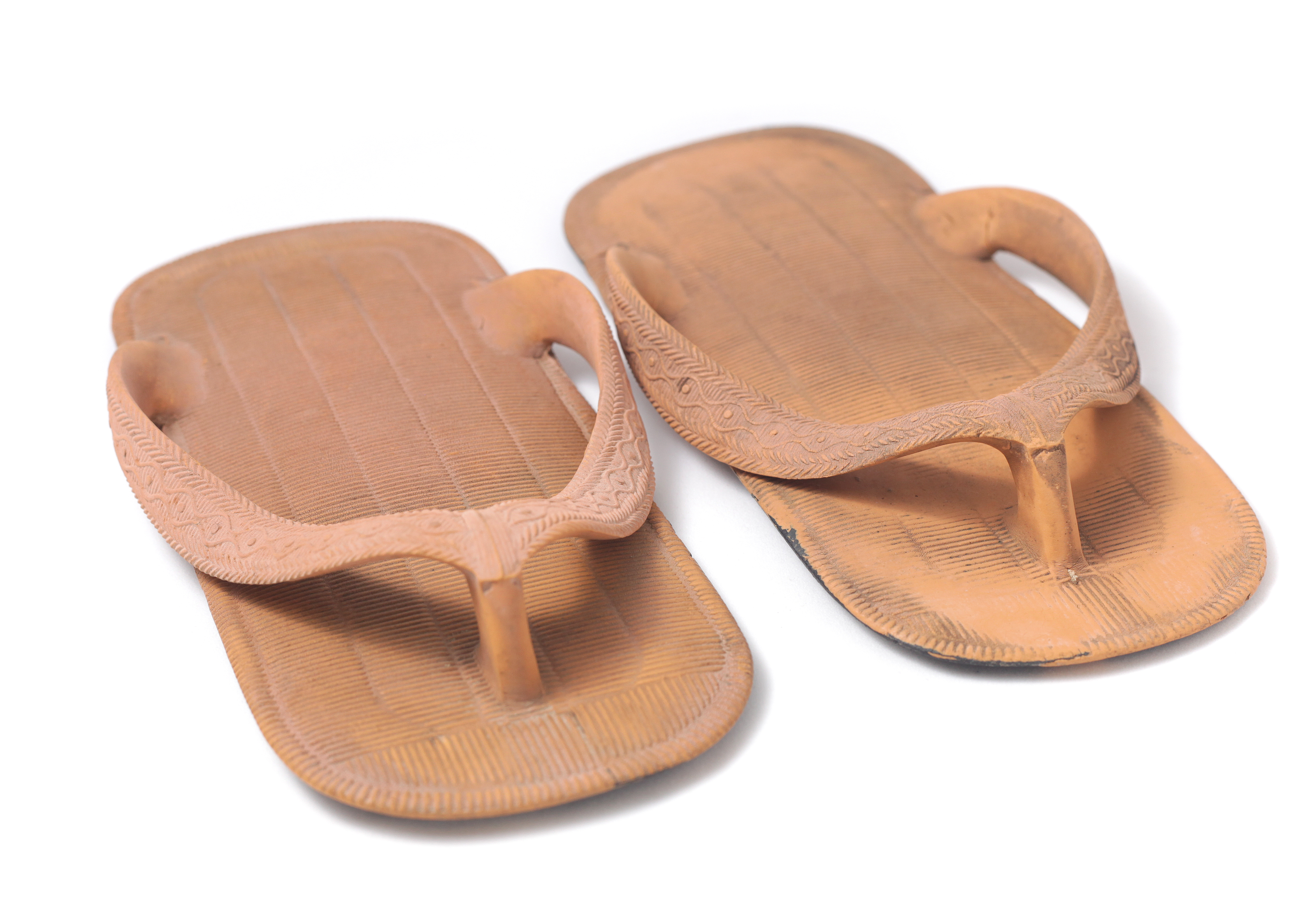 Acervo Museu da Imigração de São Paulo. Japão, década de 1950. Borracha. Doação Yasuichi Kojima. Segundo informações do doador, esse par de chinelos pertenceu ao seu irmão, Atsuyoshi Kojima. O zori é outro calçado tradicional japonês e pode ser considerado um tipo de chinelo, usado por homens e mulheres até os dias de hoje. O par exposto possui a particularidade de ser um “gomu zori” ou, literalmente, zori de borracha. Antigamente, os zori eram feitos de uma variedade de materiais, sendo a palha de arroz um dos mais usados. Porém, com a introdução da borracha no Japão no final do século XIX, os chinelos passaram a ser produzidos em larga escala com esse material. Na sola do chinelo há 4 linhas de escrita e a direção correta para a leitura é da foto com título "[...] Conrado Secassi (4)". De cima para baixo e da direita para esquerda está escrito: 1 - HIROSHIMA GOMU (significa: borrachas Hiroshima) 2 - KABUSHIKI KAISHA (significa: empresa de sociedade anônima) 3 - TOUROKU SHUNGYOU (novo empreendimento registrado) 4 - TOUROUKU SHOUHYOU (marca registrada) Essa tradução foi feita pela equipe do Museu Histórico da Imigração Japonesa no Brasil.